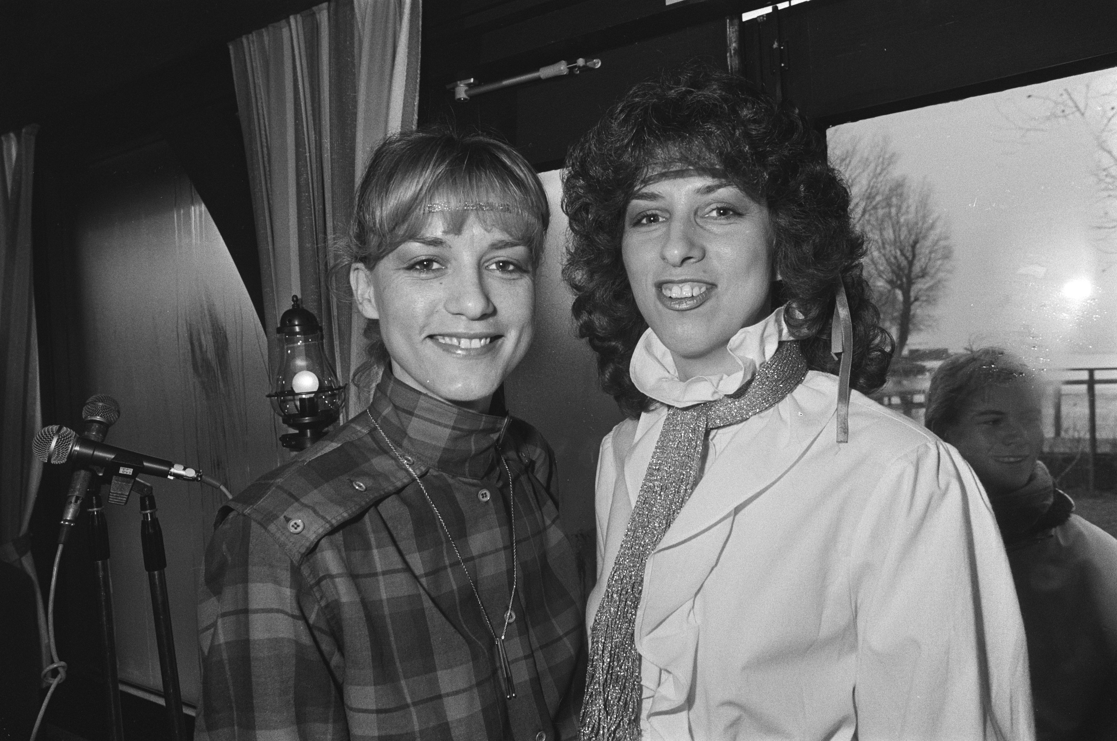 Collectie / Archief : Fotocollectie Anefo Reportage / Serie : Uitreiking "Kruiwagen" en "Conamus Export Prijs" tijdens radioprogramma Open House Beschrijving : Uitreiking "Kruiwagen" en " Export Prijs" tijdens radioprogramma Open House . Maywood Datum : 31 december 1981 Trefwoorden : RADIOPROGRAMMAS, Uitreikingen Fotograaf : Dijk, Hans van / Anefo Auteursrechthebbende : Nationaal Archief Materiaalsoort : Negatief (zwart/wit) Nummer archiefinventaris : bekijk toegang 2.24.01.05 Bestanddeelnummer : 931-8889